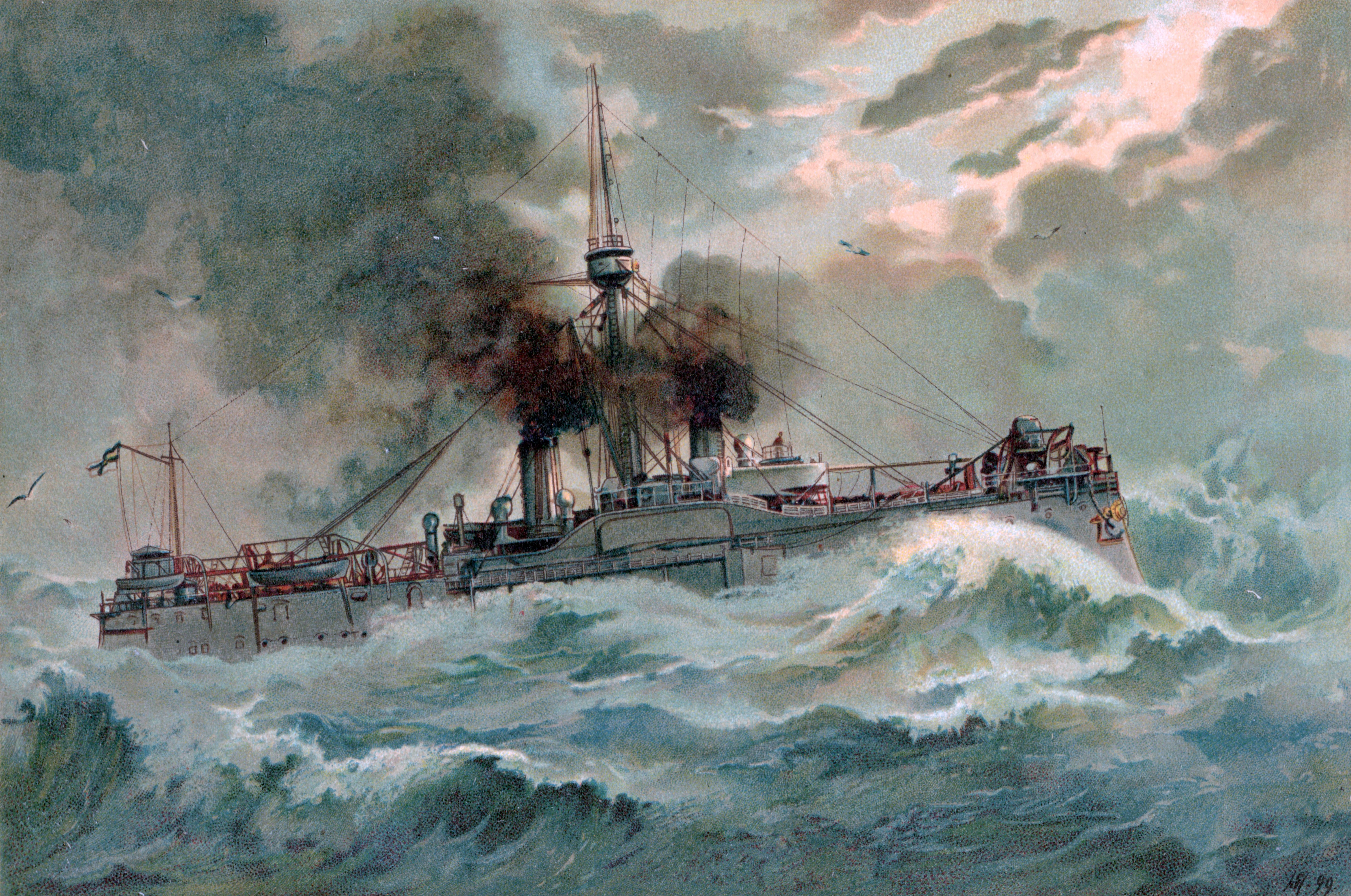 S.M. Linienschiff Oldenburg